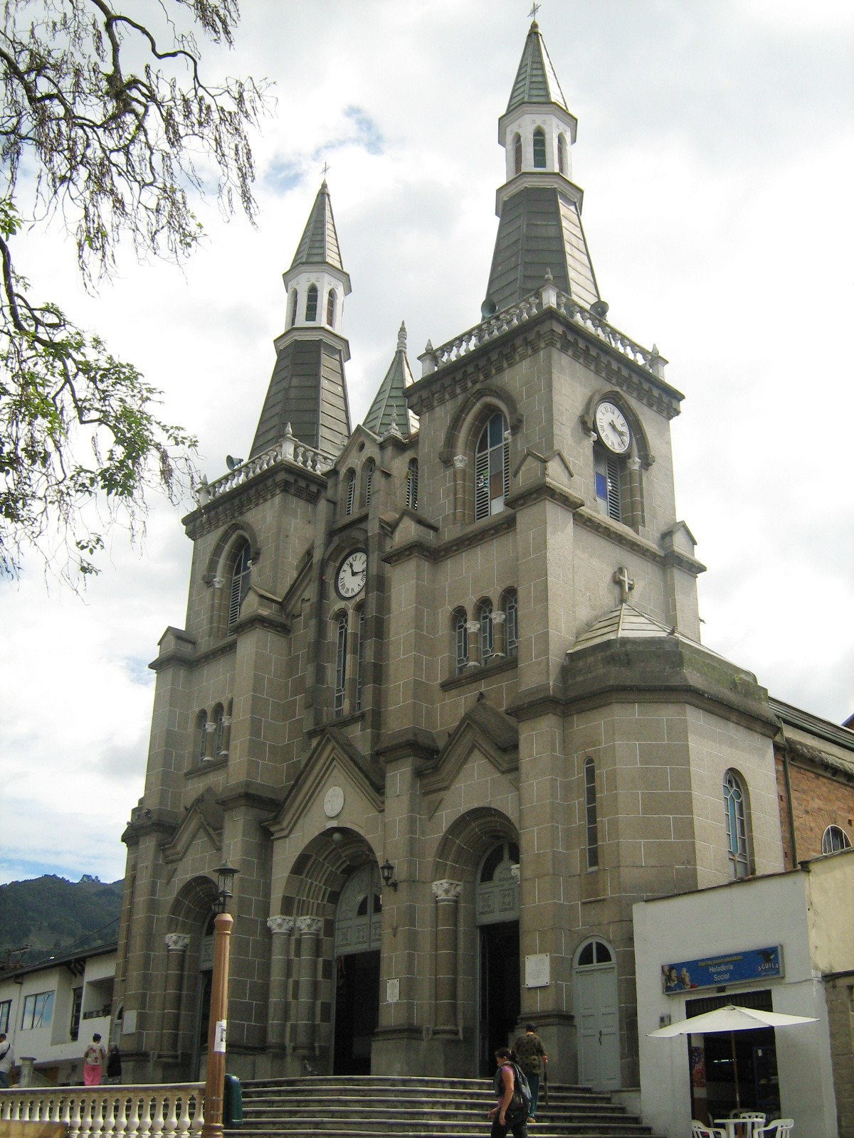 Basílica Menor Nuestra Señora del Rosario de Chiquinquira en el Municipio de La Estrella. Colombia